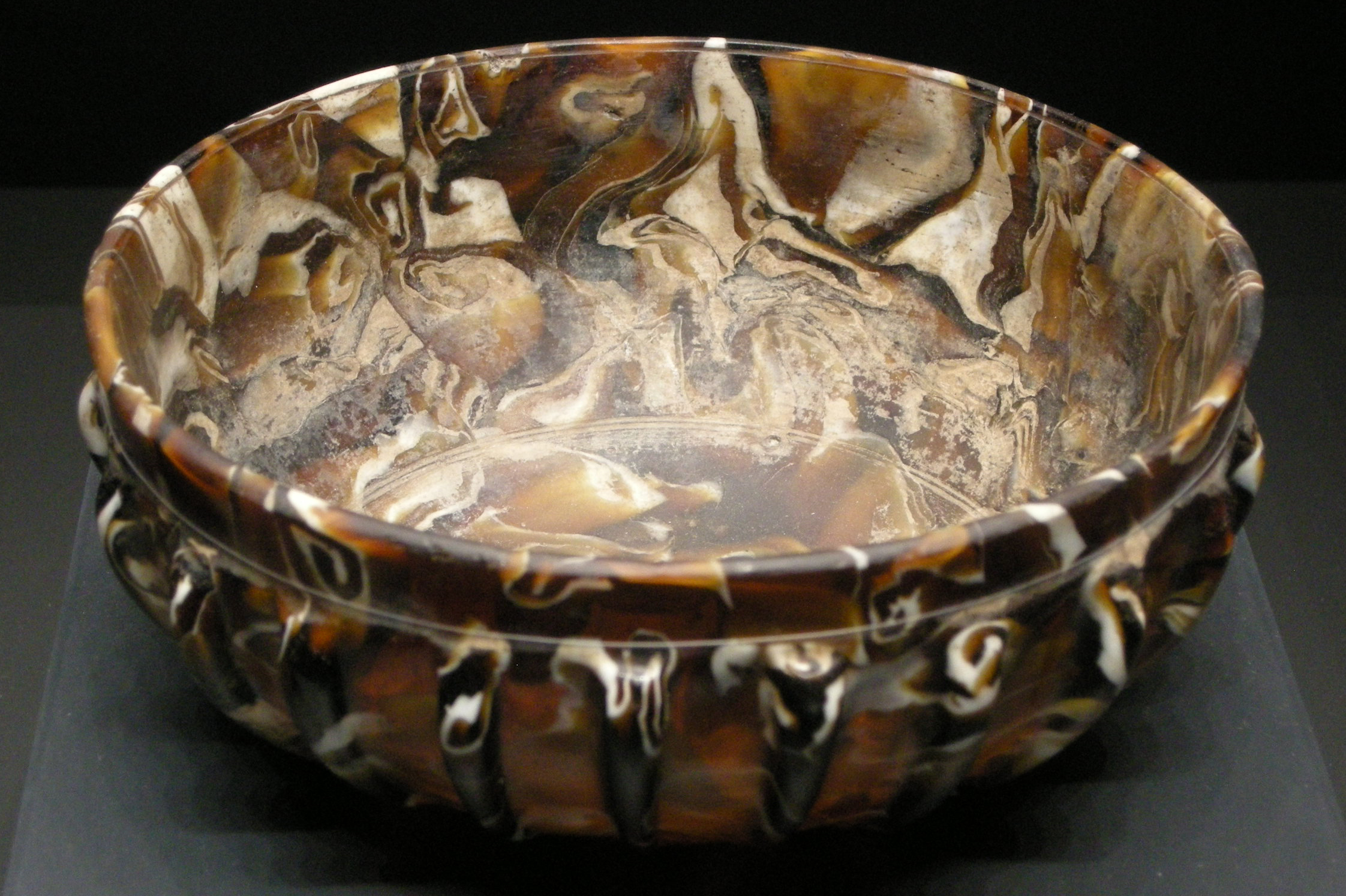 Arte romana, bacinella costolonata, I sec. ac-I sec. dc. Getty Villa